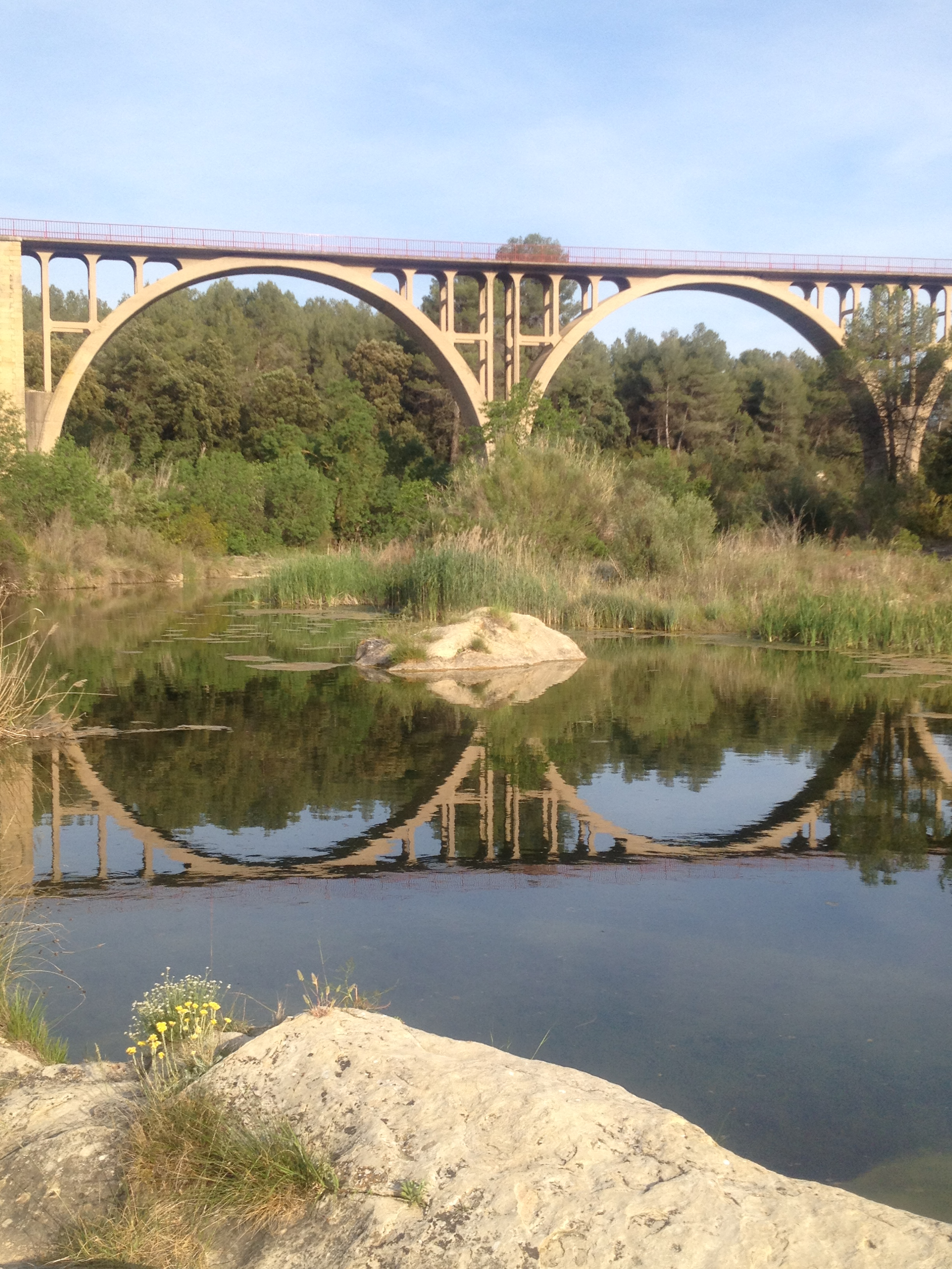 Río Algars This is a photography of a Site of Community Importance in Spain with the ID: ES2420118. Natura2000 entry, EEA entry